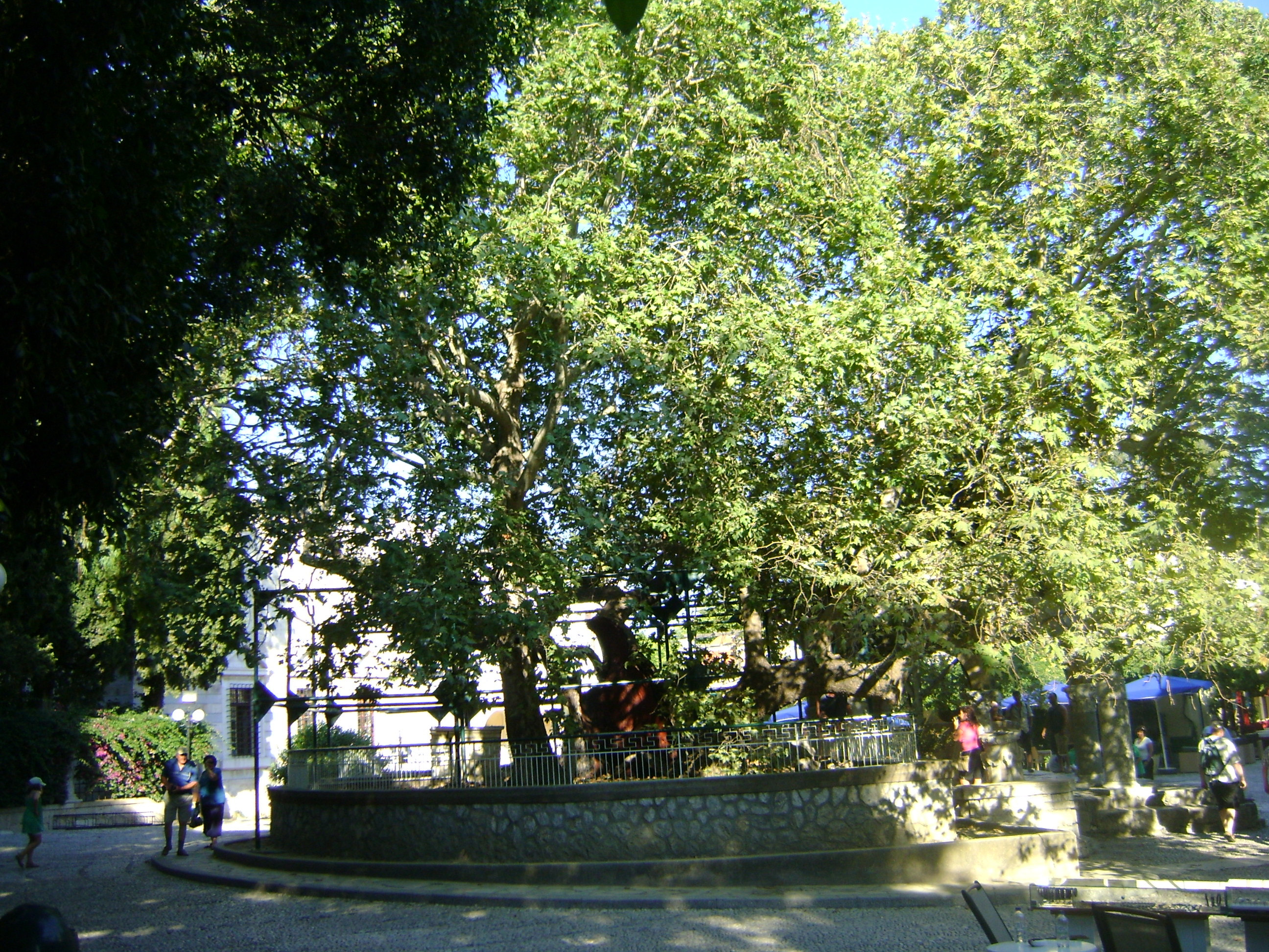 Ο πλάτανος του Ιπποκράτη στην Κω